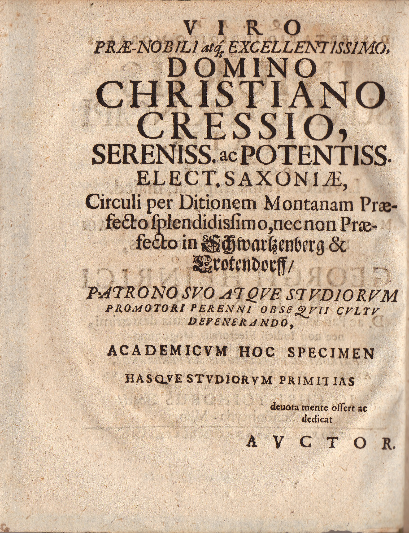 Christian Kreß war 1678 bis 1714 kurfürstlicher Amtmann des Kreisamts Schwarzenberg. Er wird in der im Jahr 1696 erschienen Dissertation des ersten Schönheider Pfarrers Johann Christpoh Vogel als Widmungsträger erwähnt. Sein Name ist in latinisierter Form, Christianus Cressius, geschrieben (hier im Dativ).